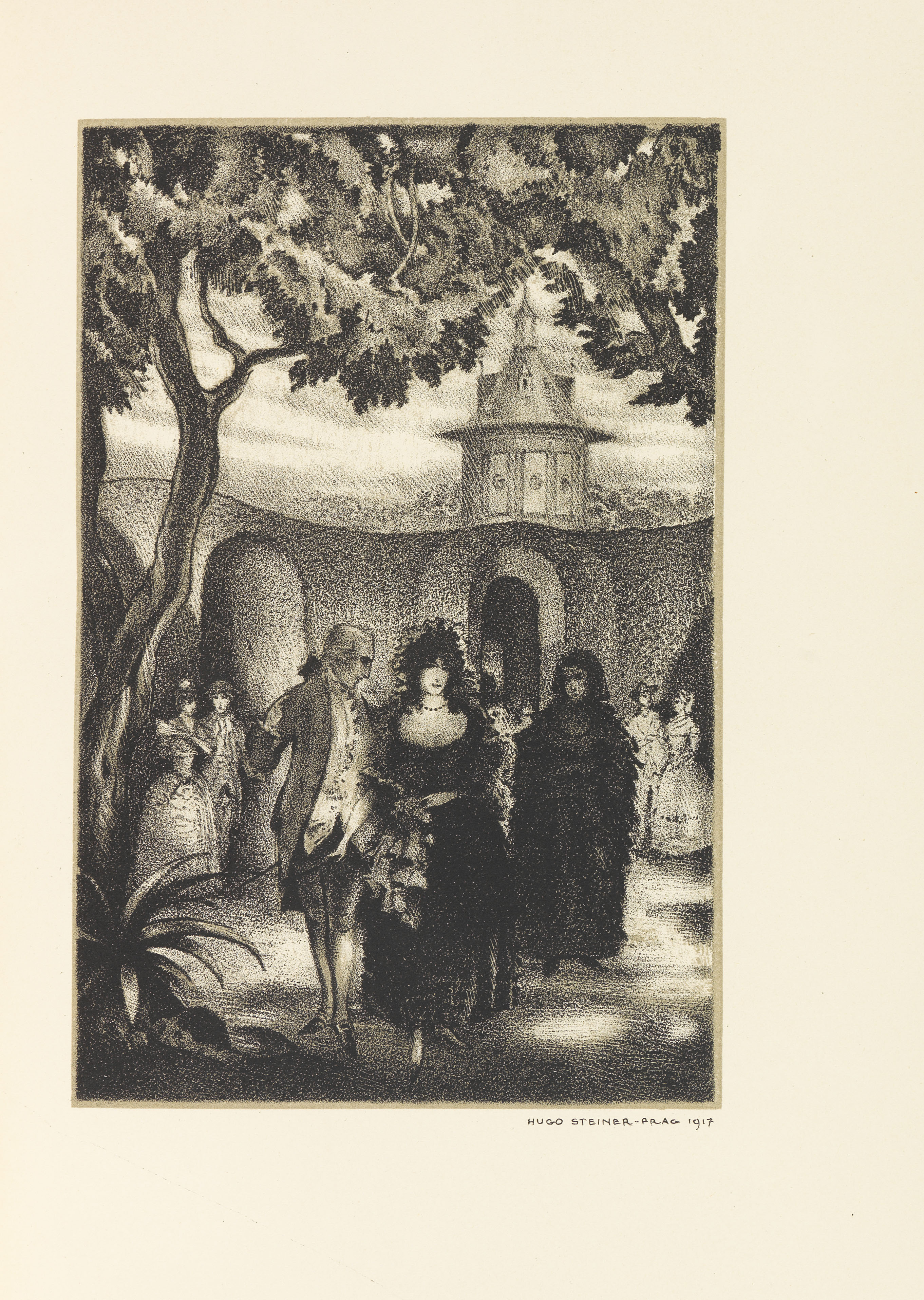 eine von 10 Lithopgraphien zu Goethe: Clavigo. Ein Trauerspiel. Weimar, Gesellschaft der Bibliophilen 1917.